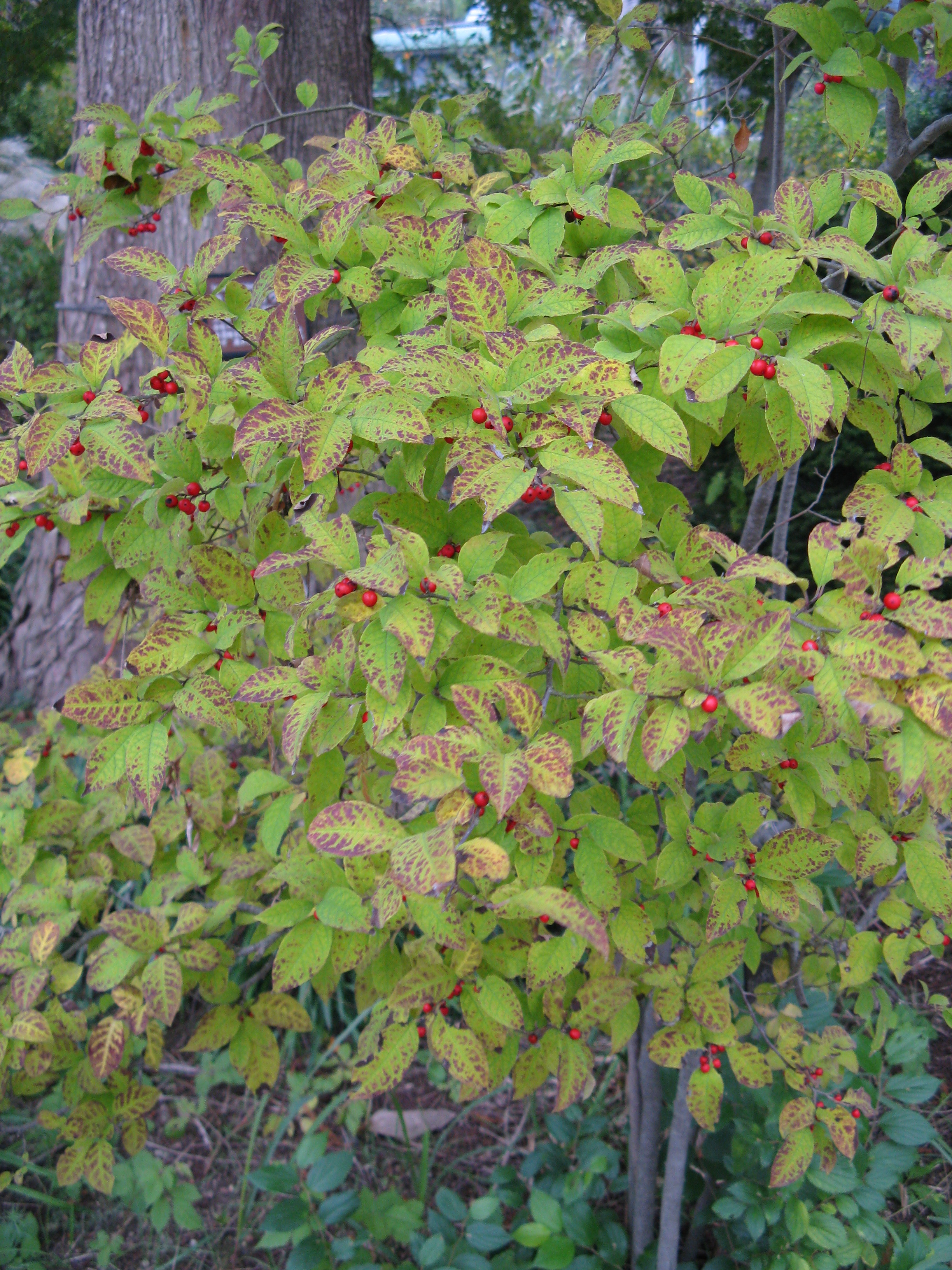 Scientific name Ilex serrata